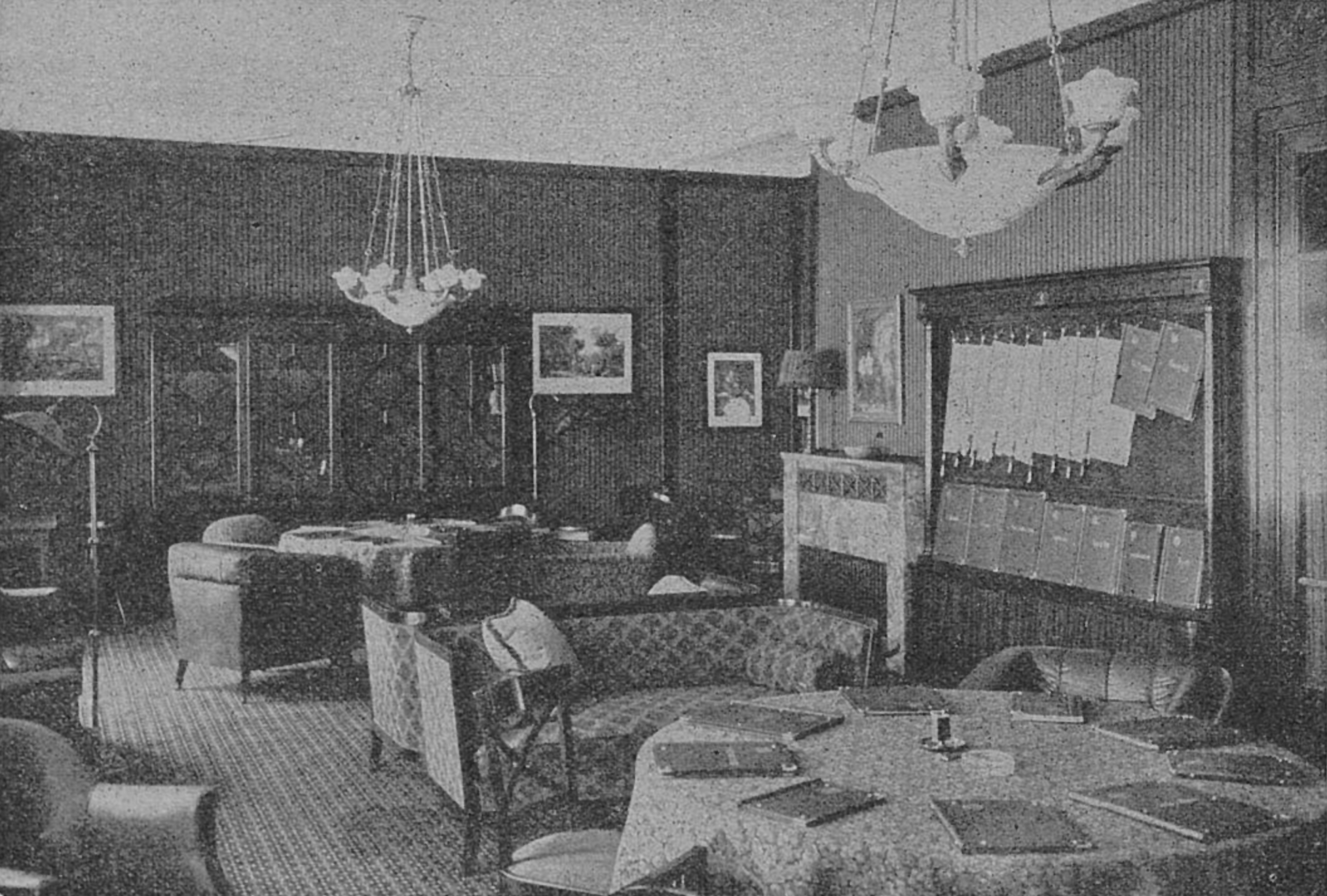 Das Lesezimmer des Industrieklubs in Düsseldorf an der Elberfelder Straße. Der Industrieklub wurde am Samstag, den 4. Oktober, offiziell eröfnet.